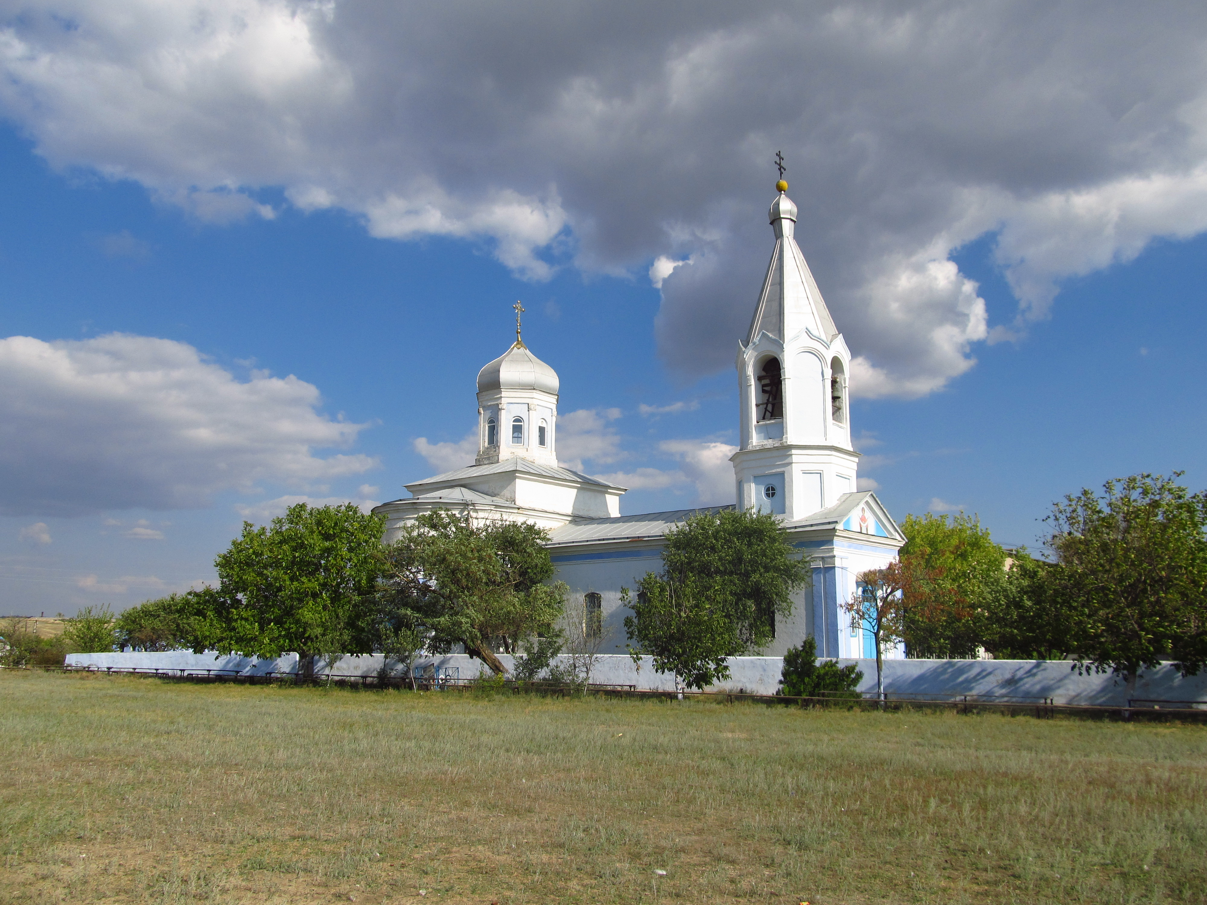 Църквата в с. Виноградное (Хасан Батър) Болградски р-н